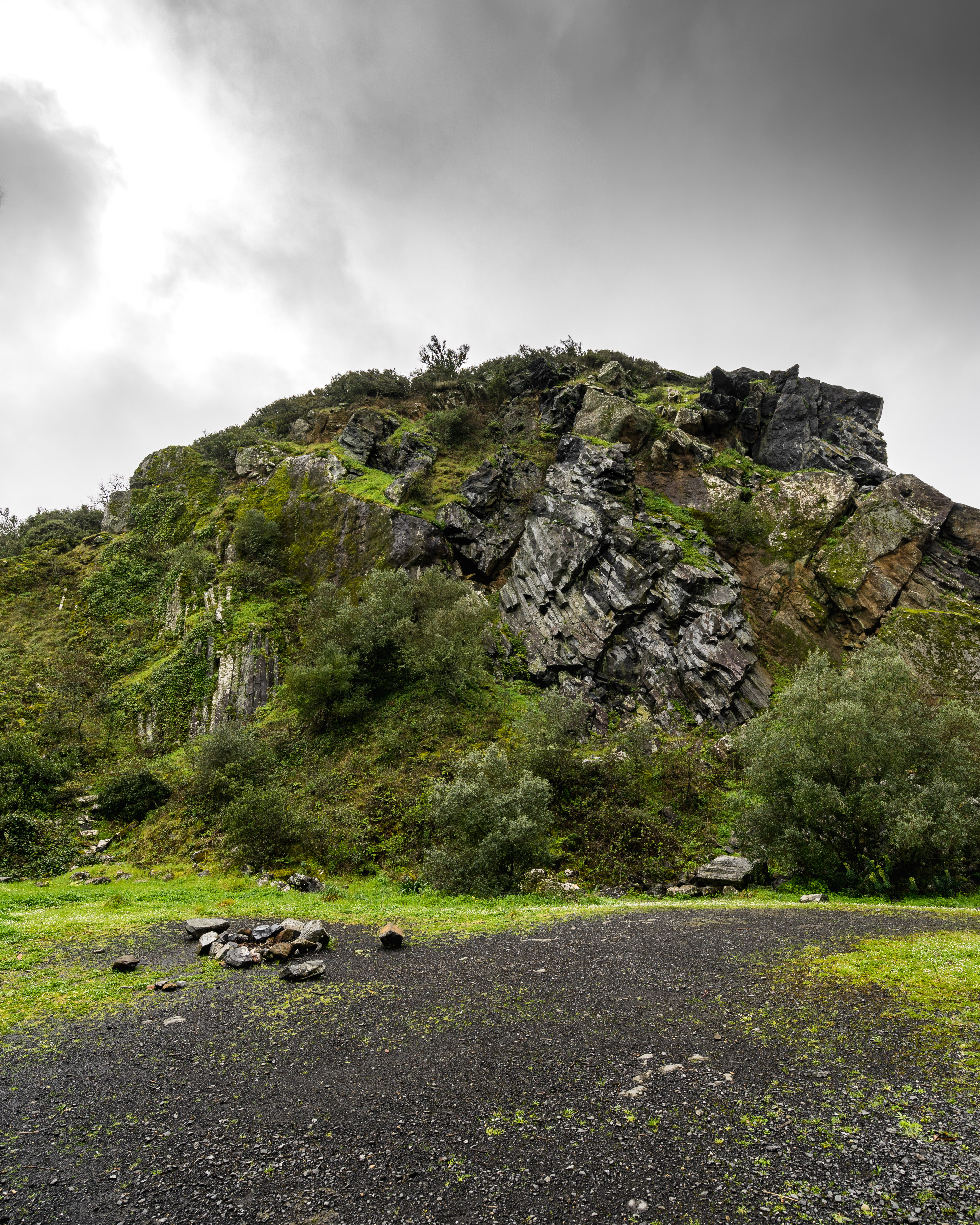 Penedo de Lexim, Portugal Cultural propertyPenedo de Lexim, Igreja Nova, Igreja Nova e Cheleiros, Mafra, Lisboa, Portugal Q66814403, SIPA ID: 6384, DGPC ID: 73458 Wiki Loves Monuments ID: DGPC-73458